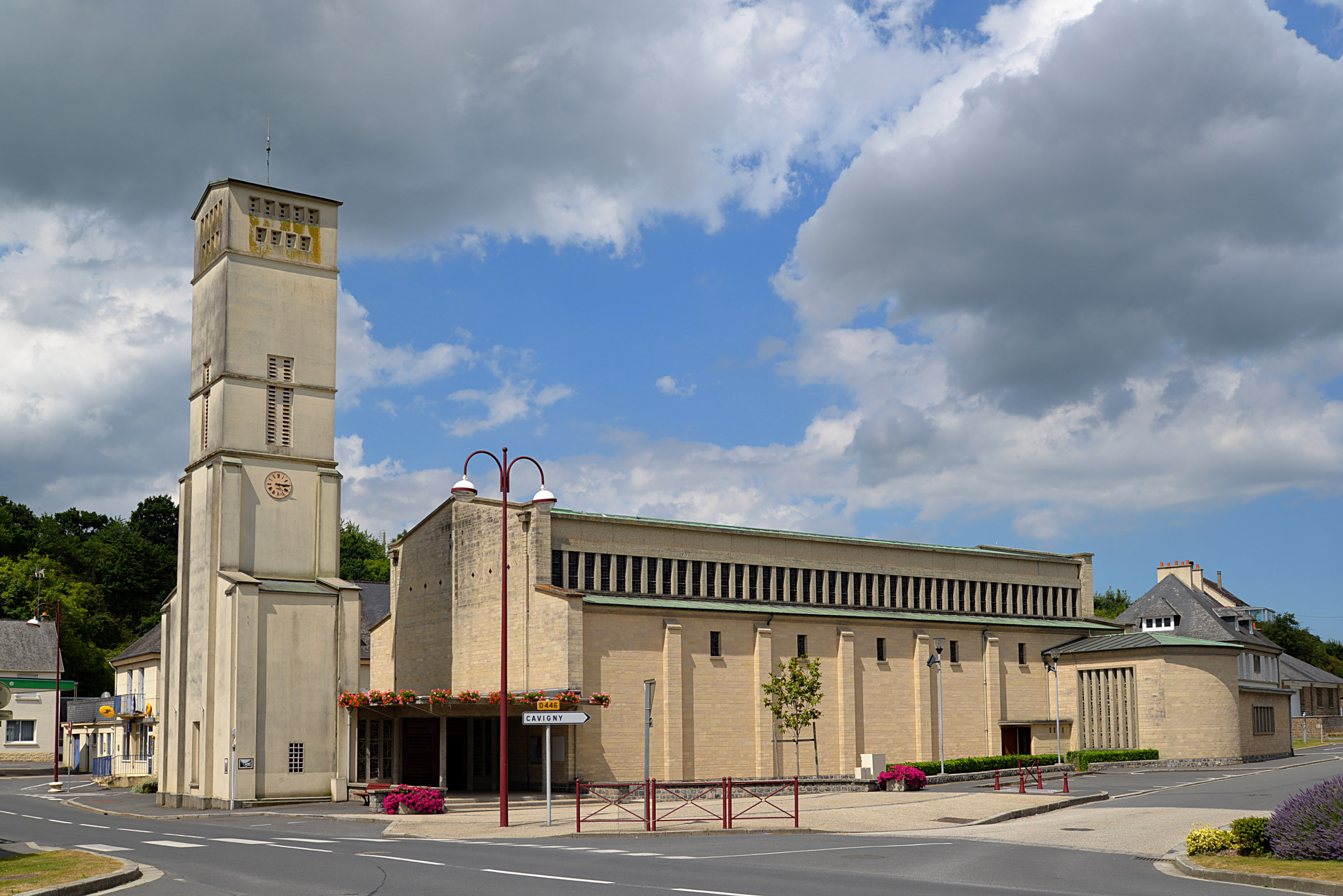 Pont-Hébert (Manche)